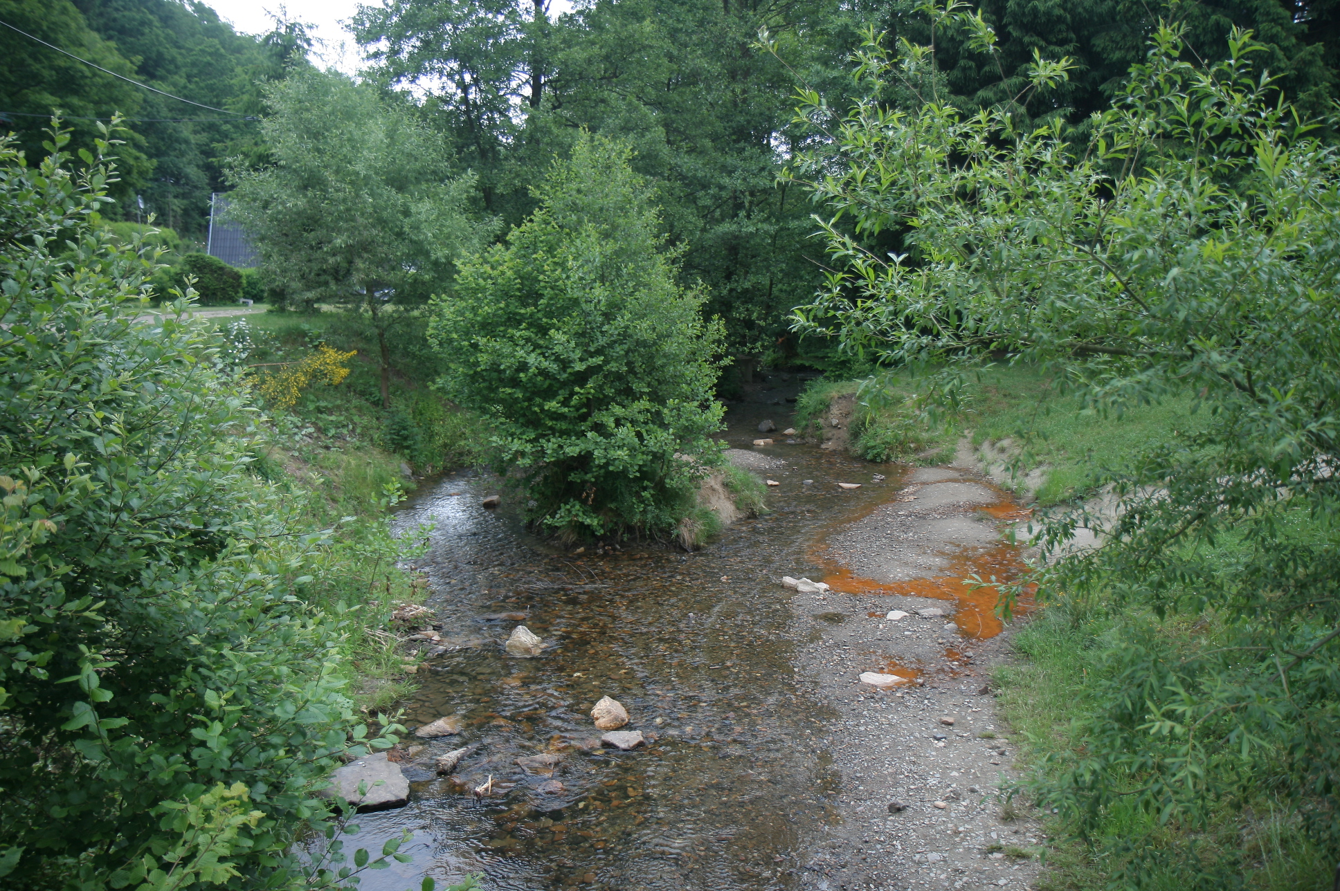 Der Fischbach (Nahe) in Asbacherhütte.